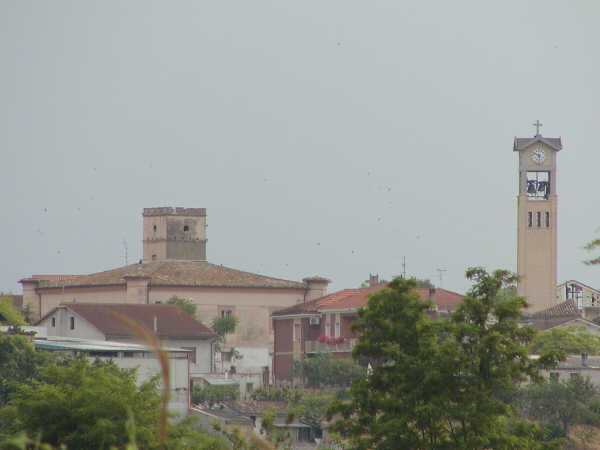 Fotografia di Brecciarola (Chieti). Il Casone ed il Campanile. Foto personale anno 2003